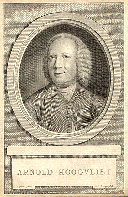 Arnold Hoogvliet, Dutch poet, by N. Reijers/P.W. v. Megen